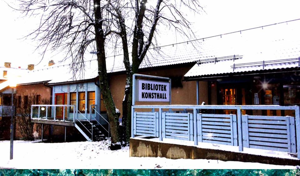 Nora bibliotek och Nora Konsthall